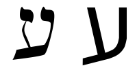 hebrew letter ayin